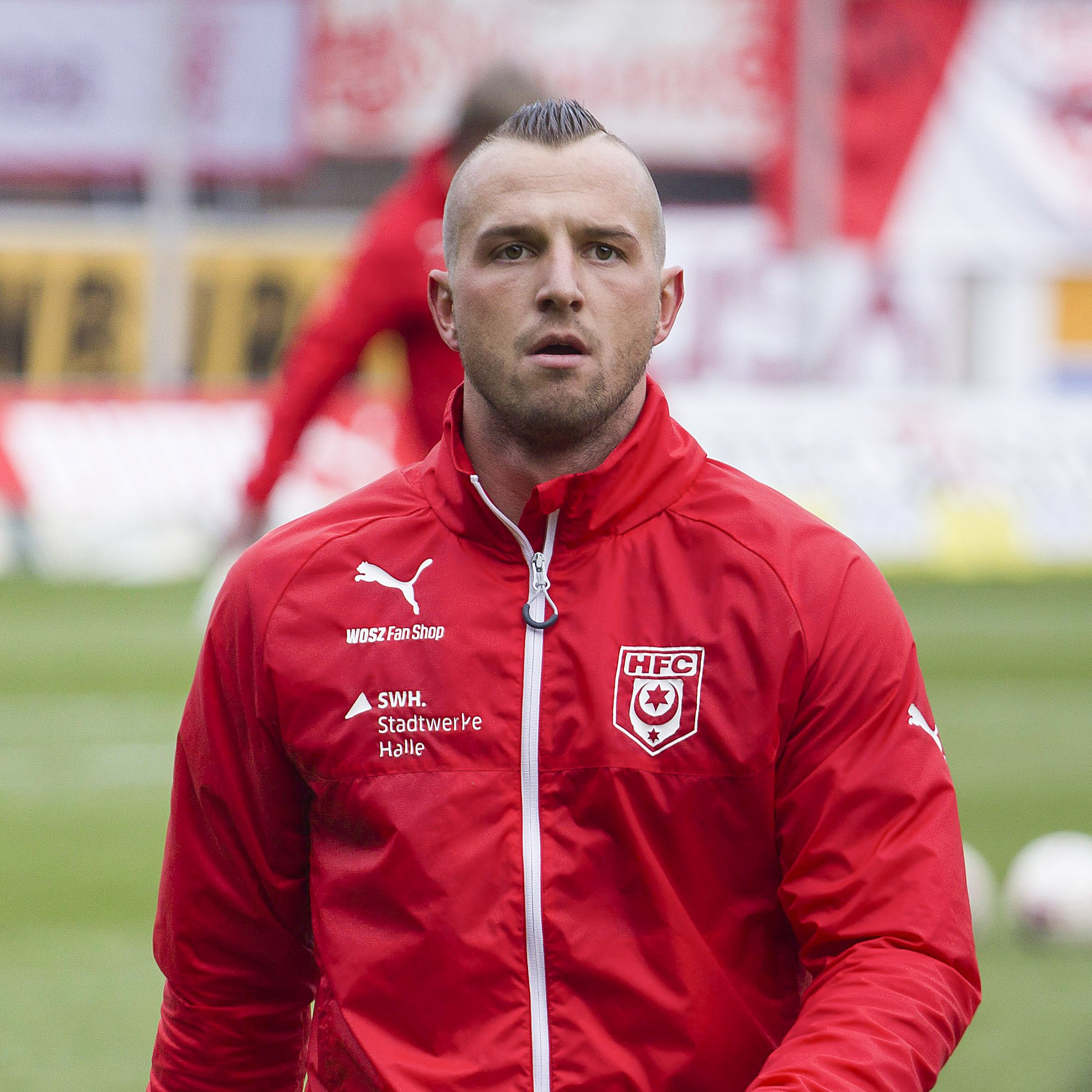 Toni Lindenhahn 2016